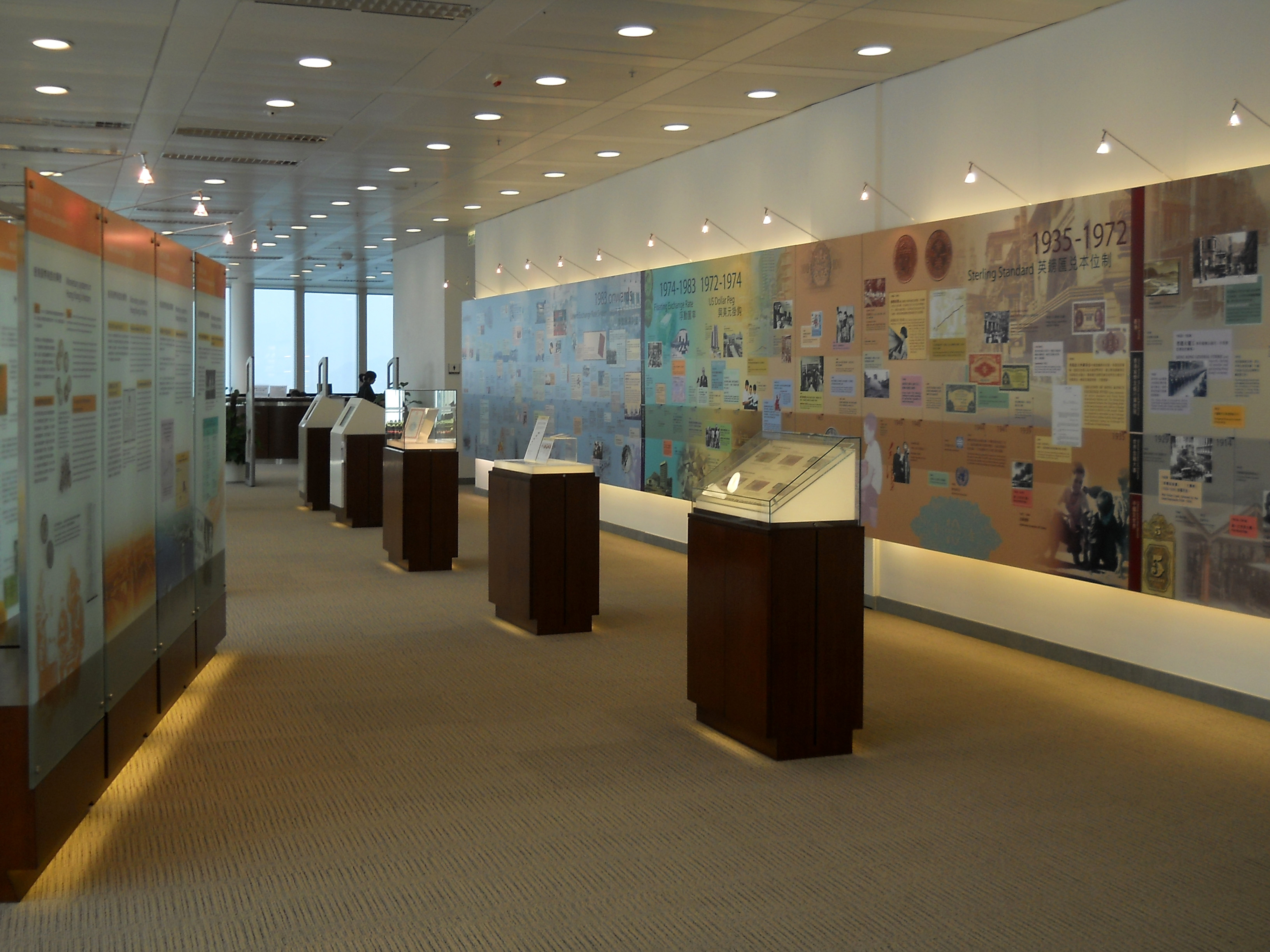 中文（香港）: 金管局資訊中心展覽館